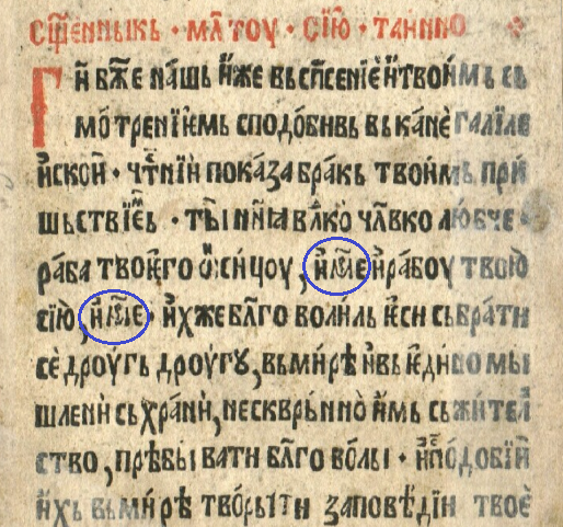 Молитвослов. Милешева : Типография Милешевского Вознесенского монастыря, печатники Дамиан и Милан, 20 сентября 1546 года. Молитва из Чина венчания. Имярек обведены синим контуром.